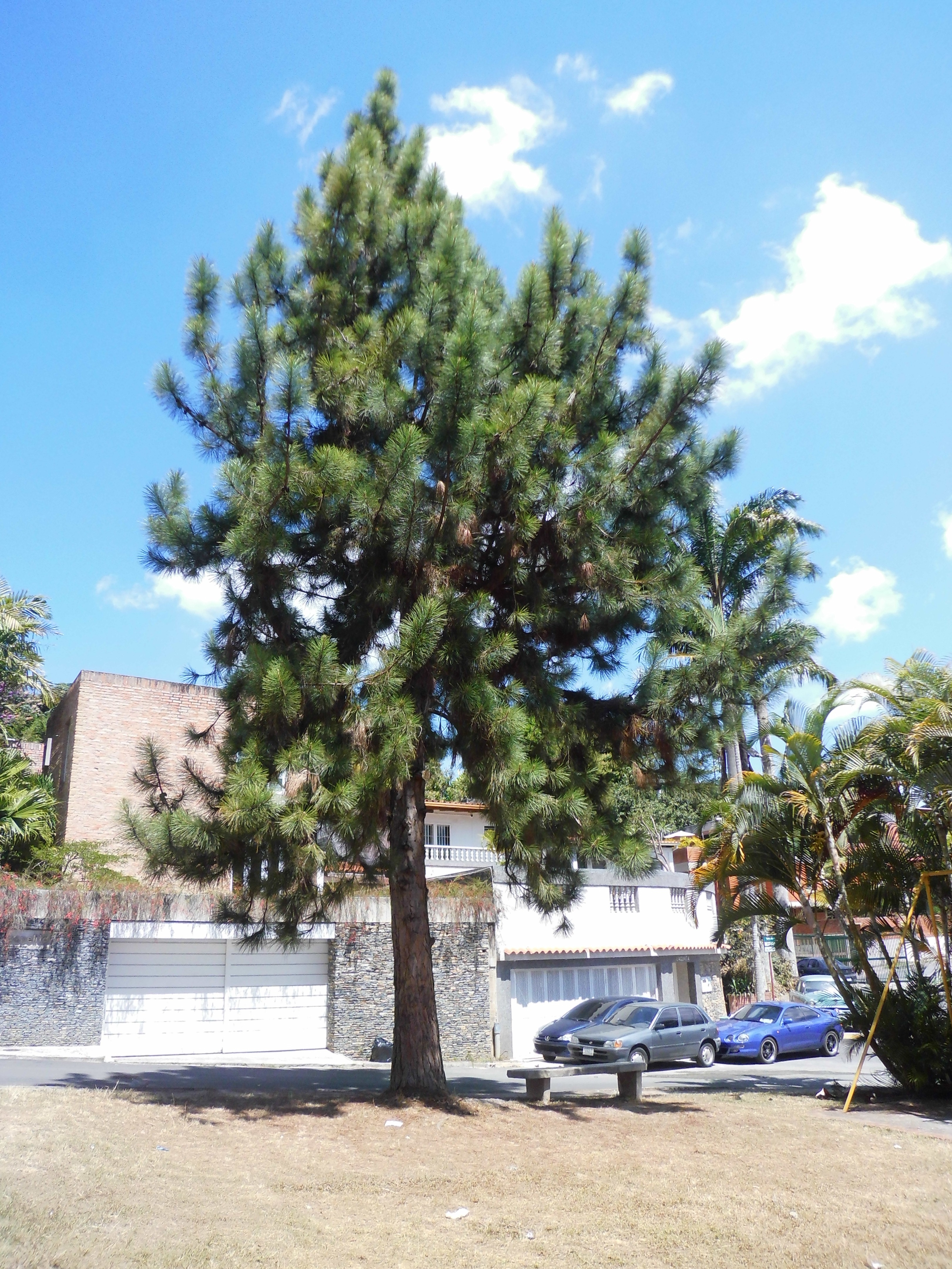 Pinus caribaea Morelet 1851 localizadas en La Boyera y Los Pinos 1 en el municipio El Hatillo, estado Miranda - Venezuela.